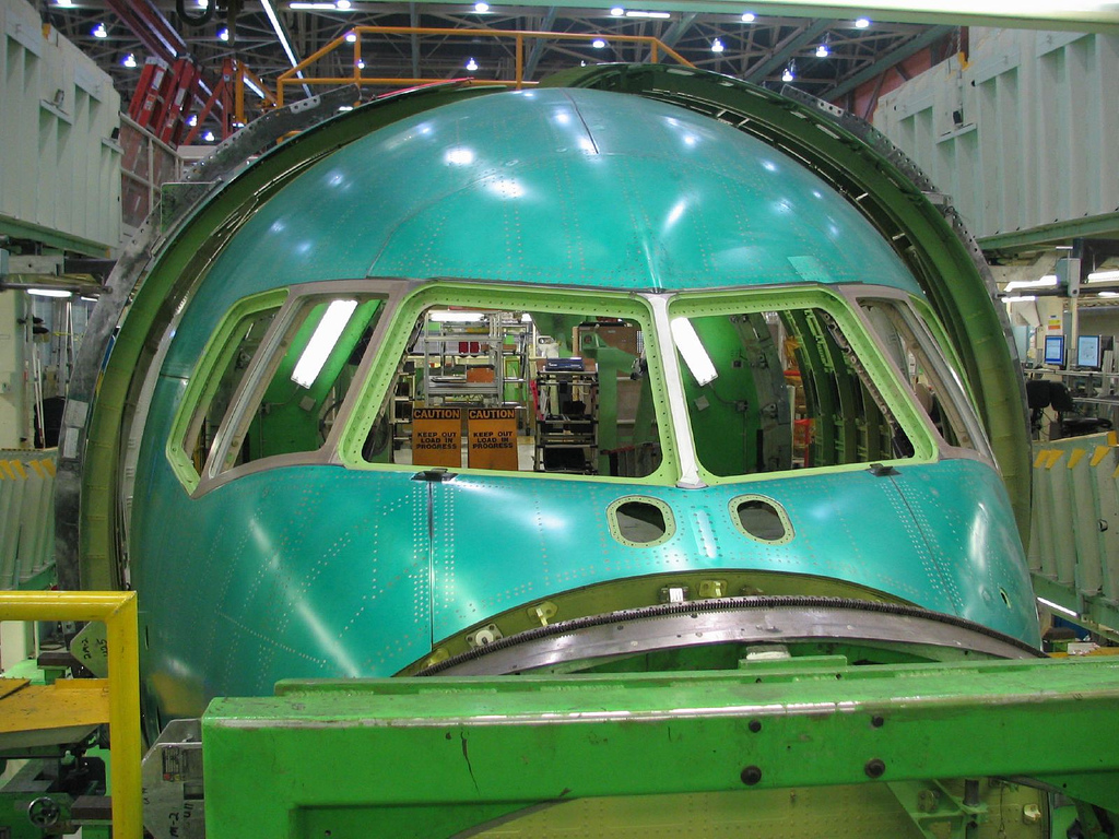 Everett assembly line